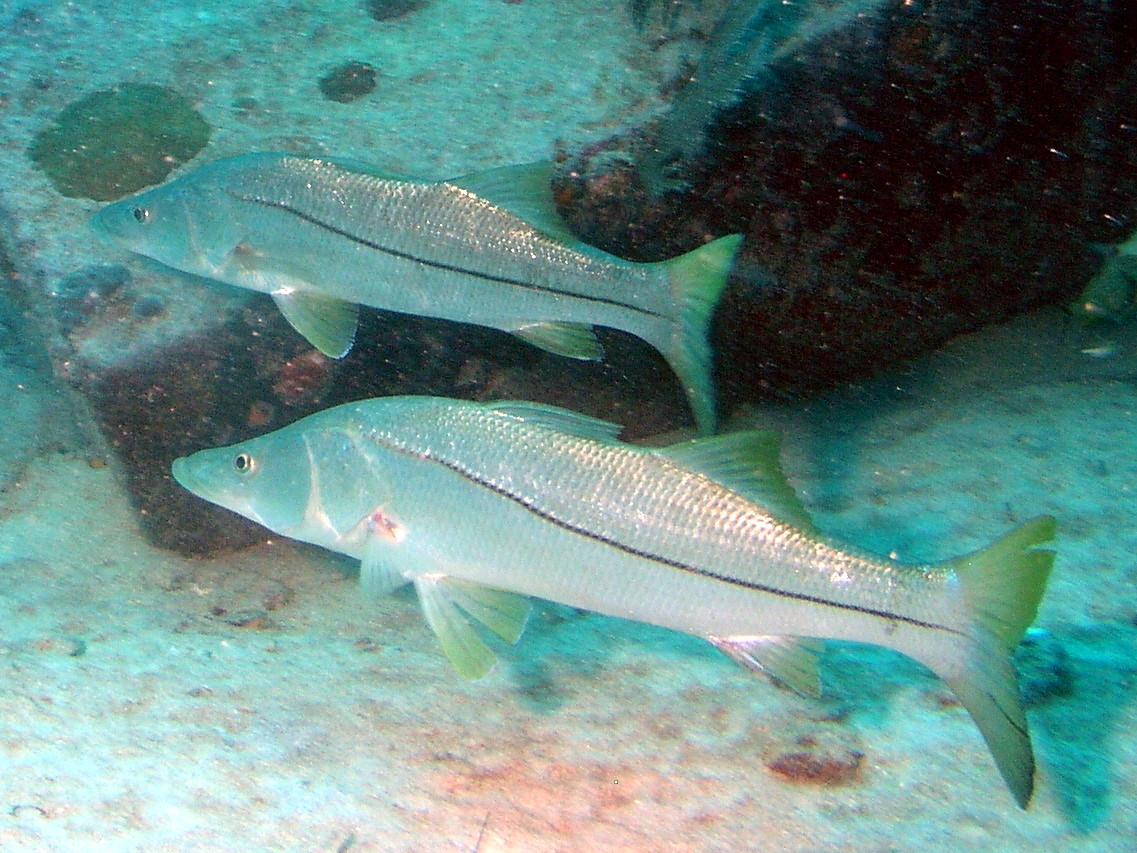 Centropomus sp.